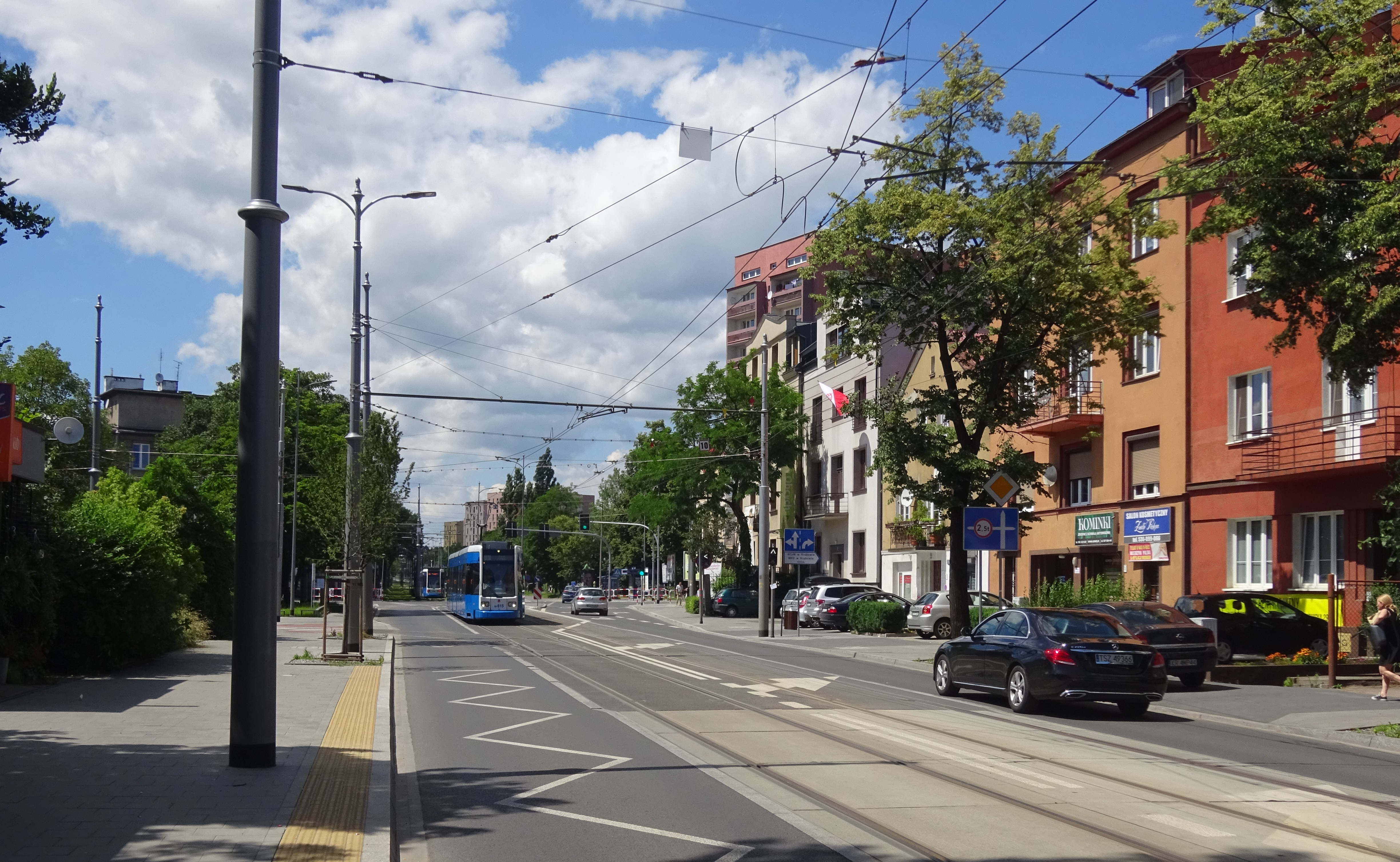 Ulica Bronowicka w Krakowie, widok w rejonie pętli Bronowice na północny zachód.